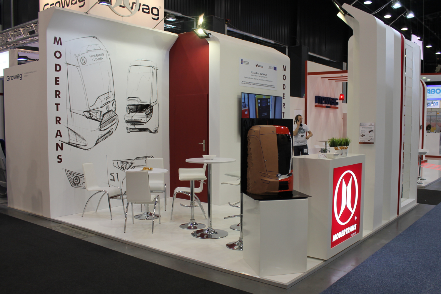 Stoisko Modertransu podczas targów Trako 2015. The making of this document was supported by Wikimedia Polska Association, within Wikigrant no. WG 2015-34. English | polski | +/−